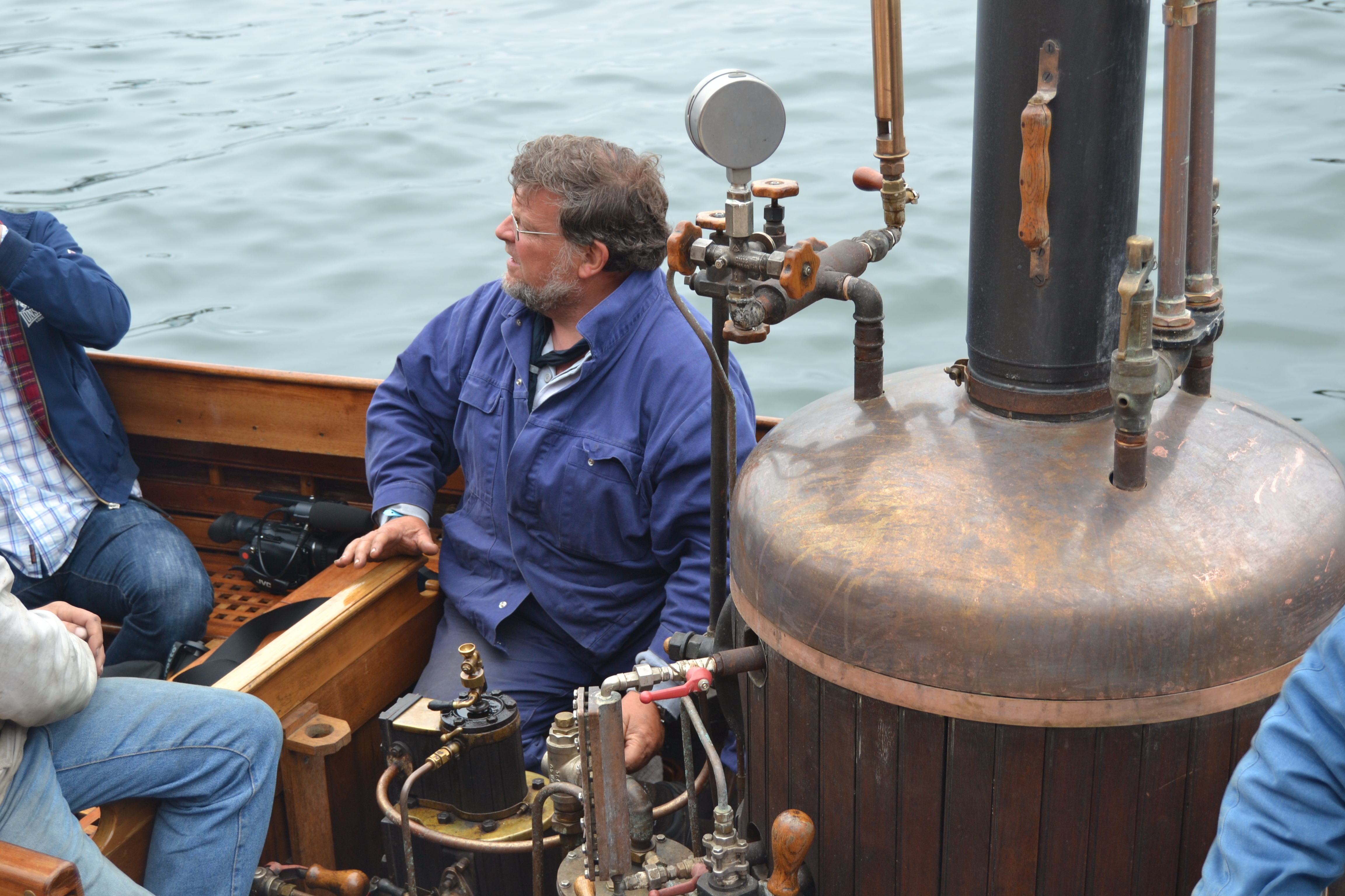 Balade sur les pontons PLLegouill